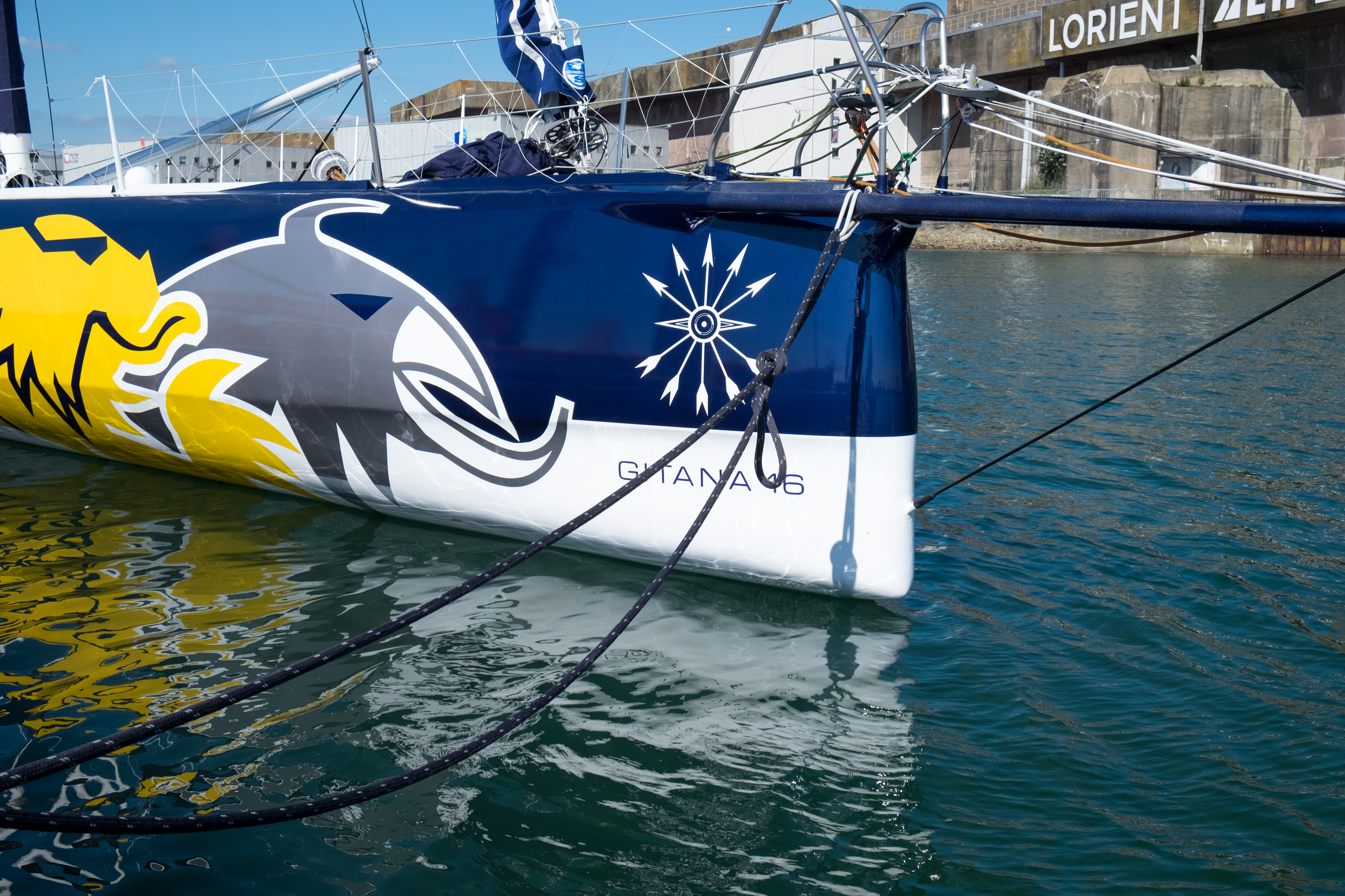 L'étrave du 60 pieds IMOCA Gitana 16, skippé par Sébastien Josse.